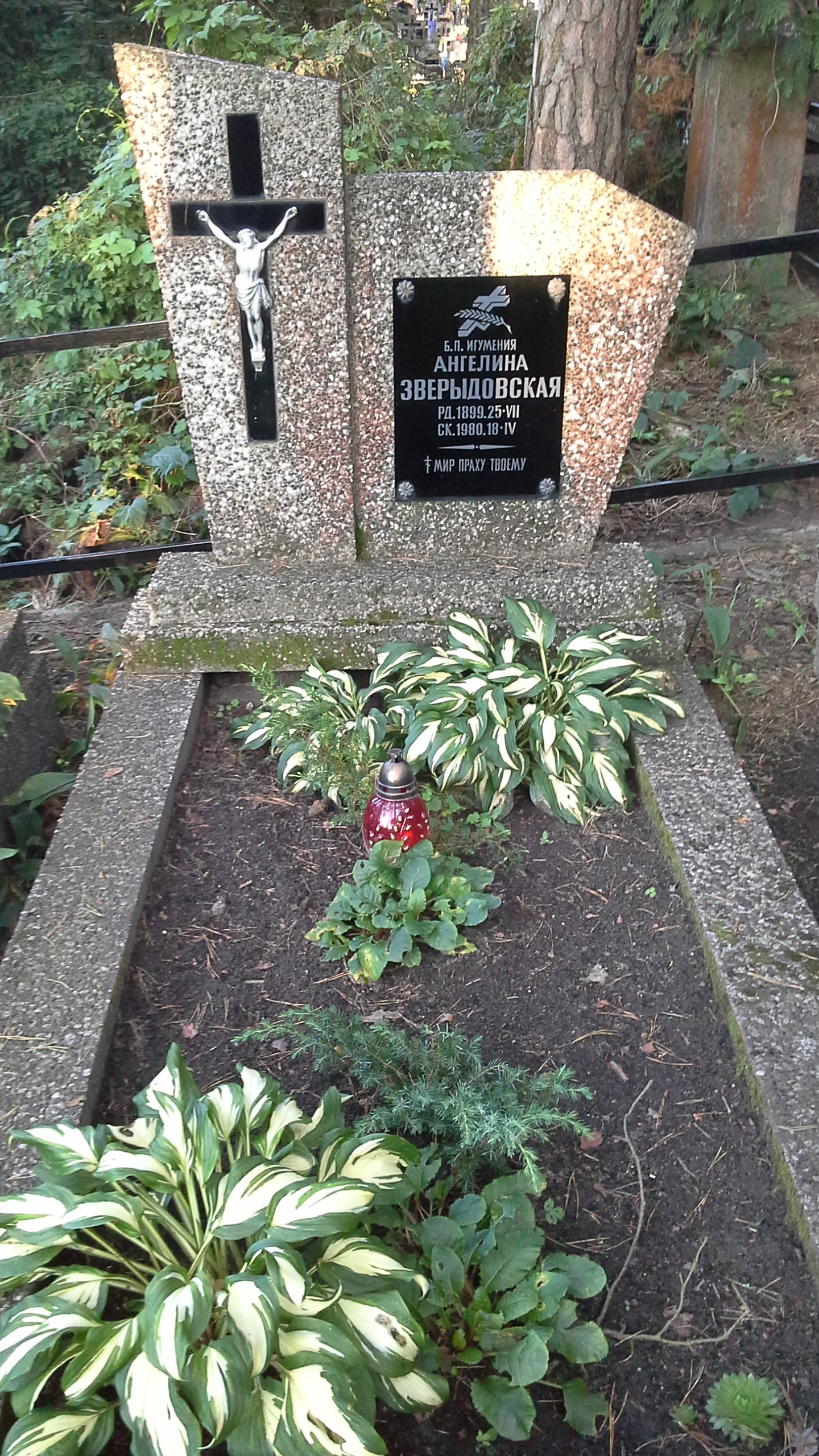 Grób ihumenii Angeliny (Zwierydowskiej) na cmentarzu monasteru na Grabarce